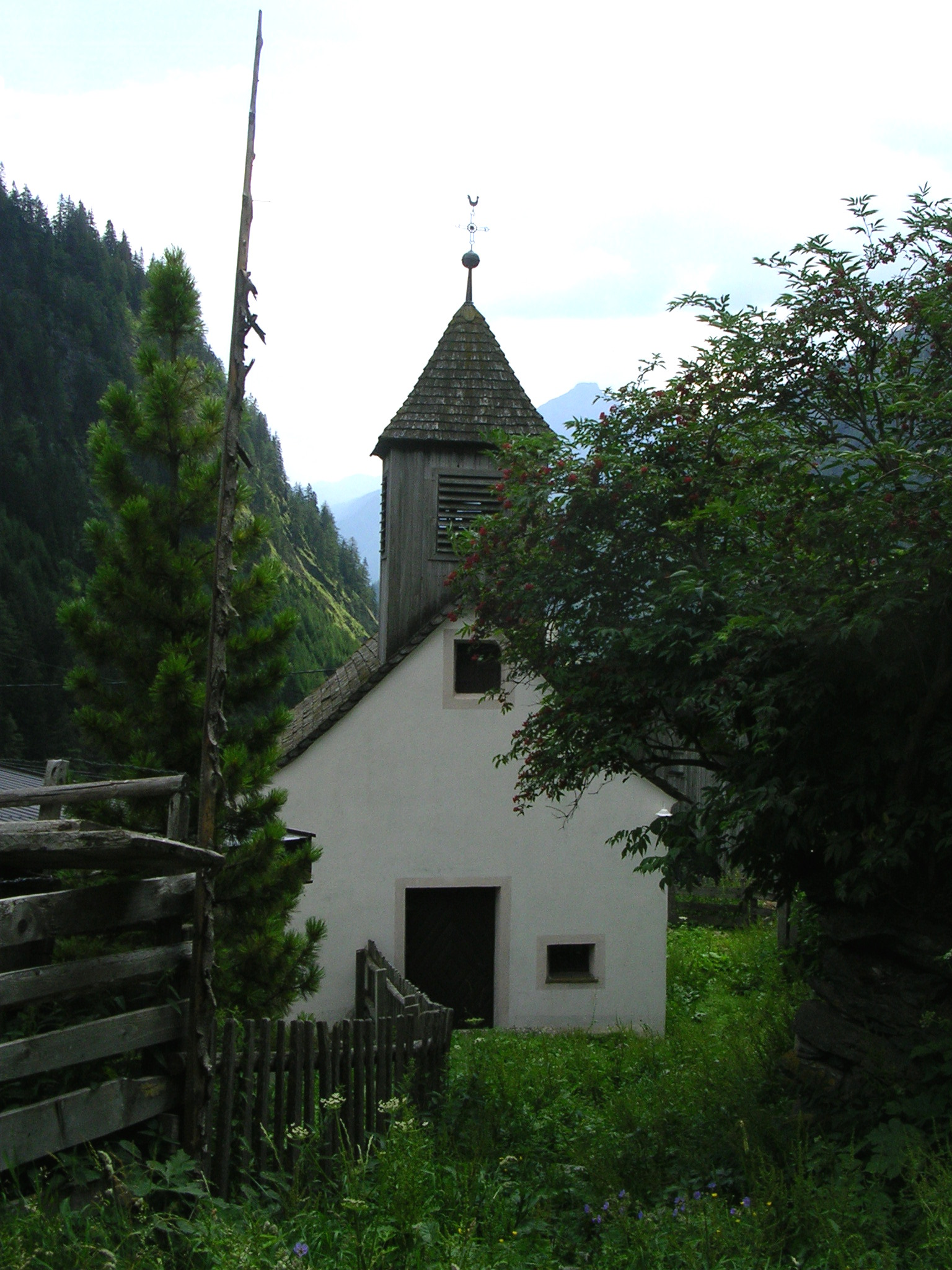 Die Kapelle (der Fraktion Berg (Gemeinde Matrei in Osttirol), auch Bergerkirchle genannt